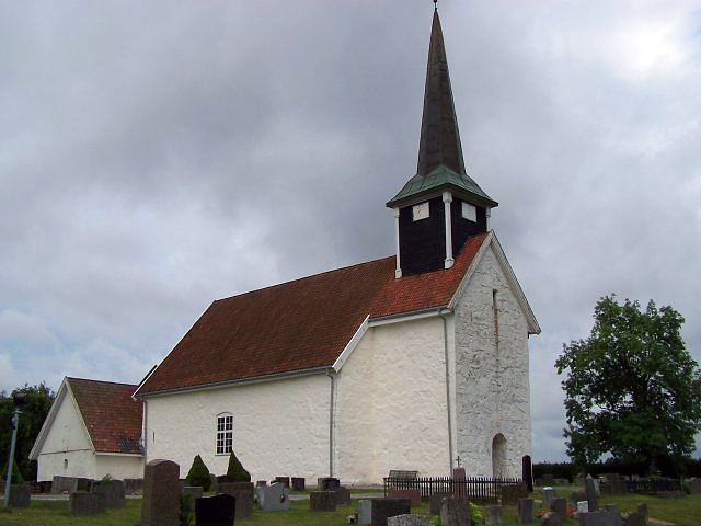 Enebakk kirke i Enebakk kommune, Akershus, Norway